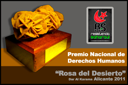 Premio Nacional Rosa del Desierto